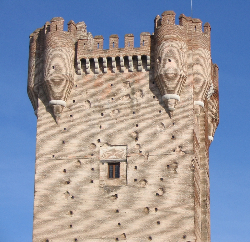 Castillo de la Mota. Medina del Campo (Valladolid). Detalle de la Torre del Homenaje. En ella se pueden apreciar aún las huellas de los impactos de la artillería enemiga, a largo de su historia.